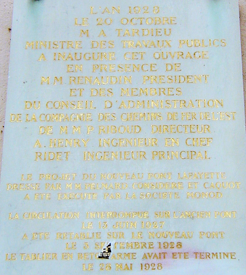 Paris - Pont La Fayette - Plaque commémorative